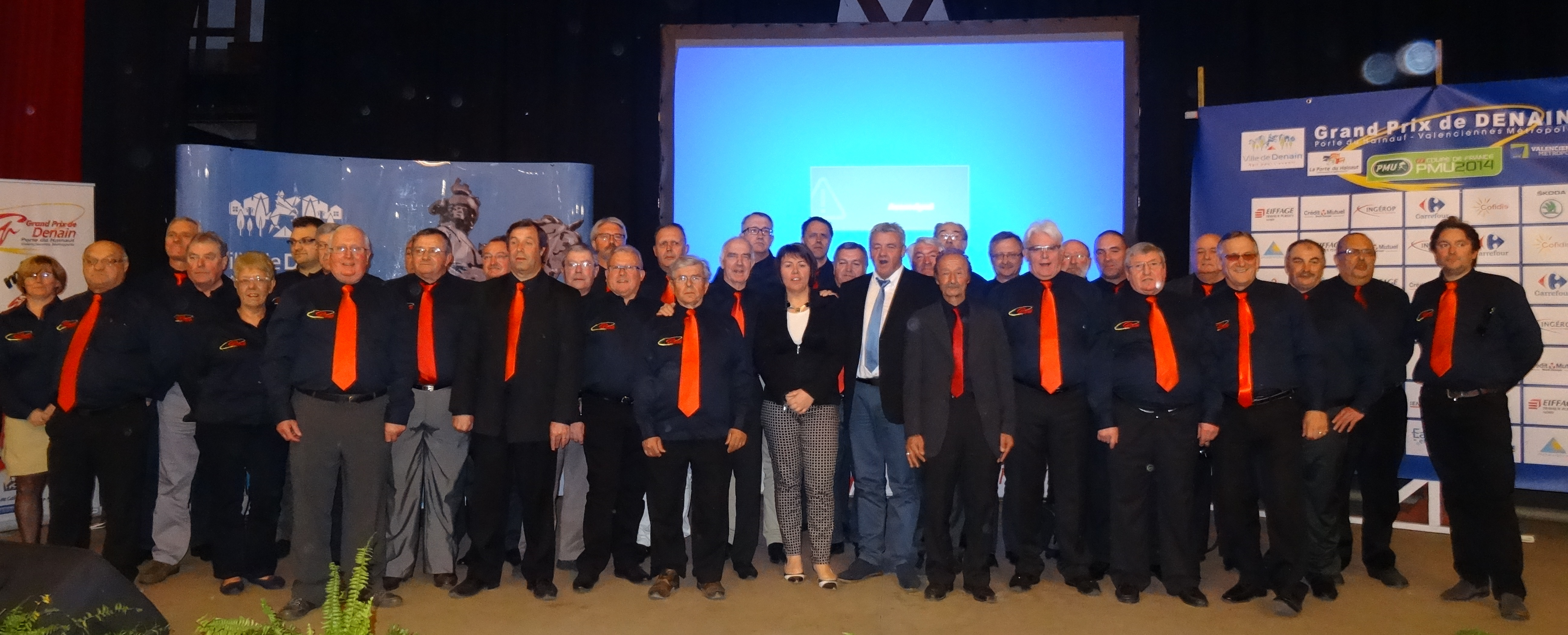 Présentation de l'édition 2014 du Grand Prix de Denain le lundi 31 mars 2014, à partir de 19 h, dans la salle Baudin, à Denain.